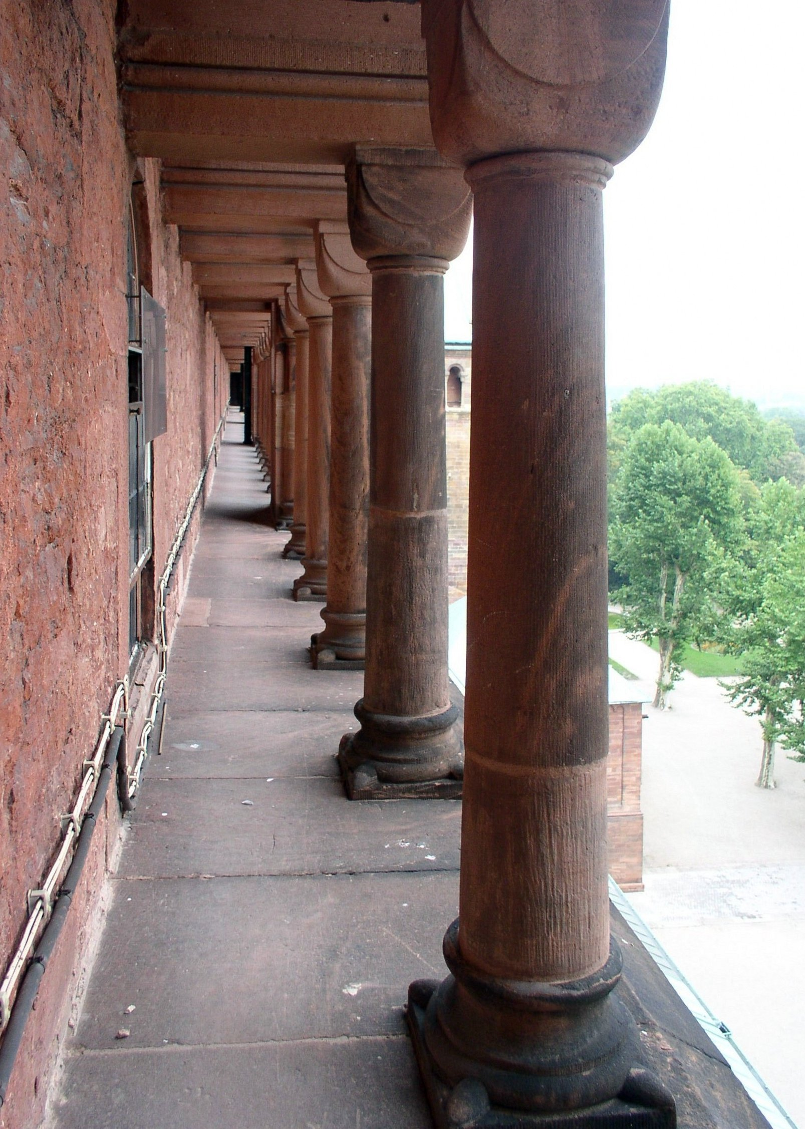 Zwerggalerie am Speyerer Dom